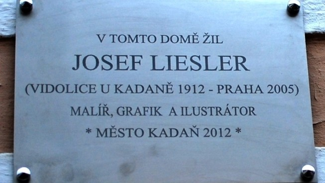 Pamětní deska Josefa Lieslera v Kadani, Nerudova čp. 356.